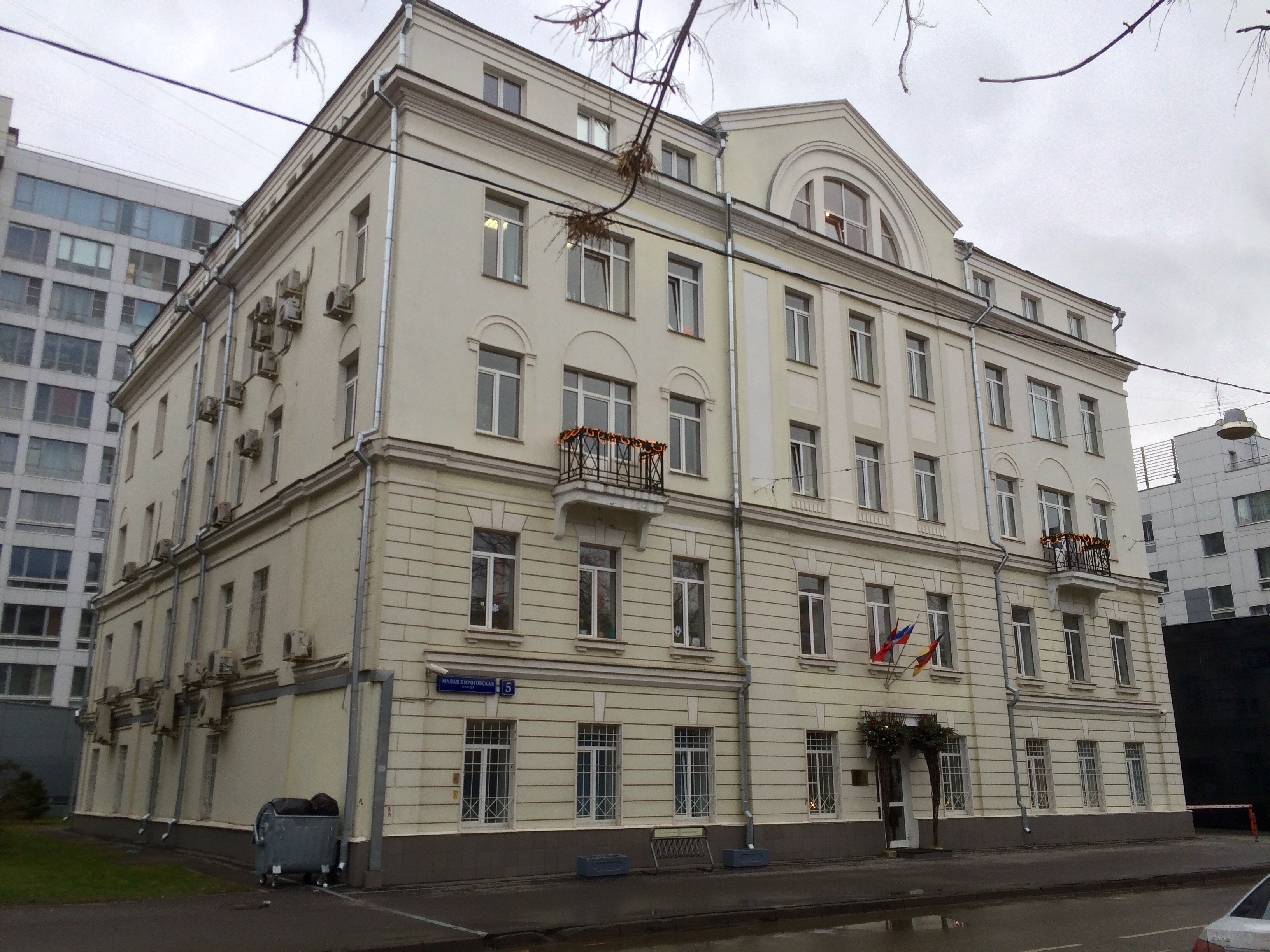 Malaya Pirogovskaya street